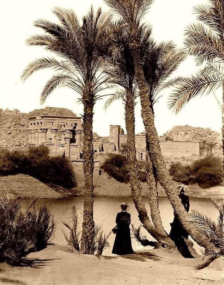 مشهد يجمع نهر النيل وعلى جانبيه أشجار النخيل وجزيرة فيلة مع معبد إيزيس في أسوان عام 1890.